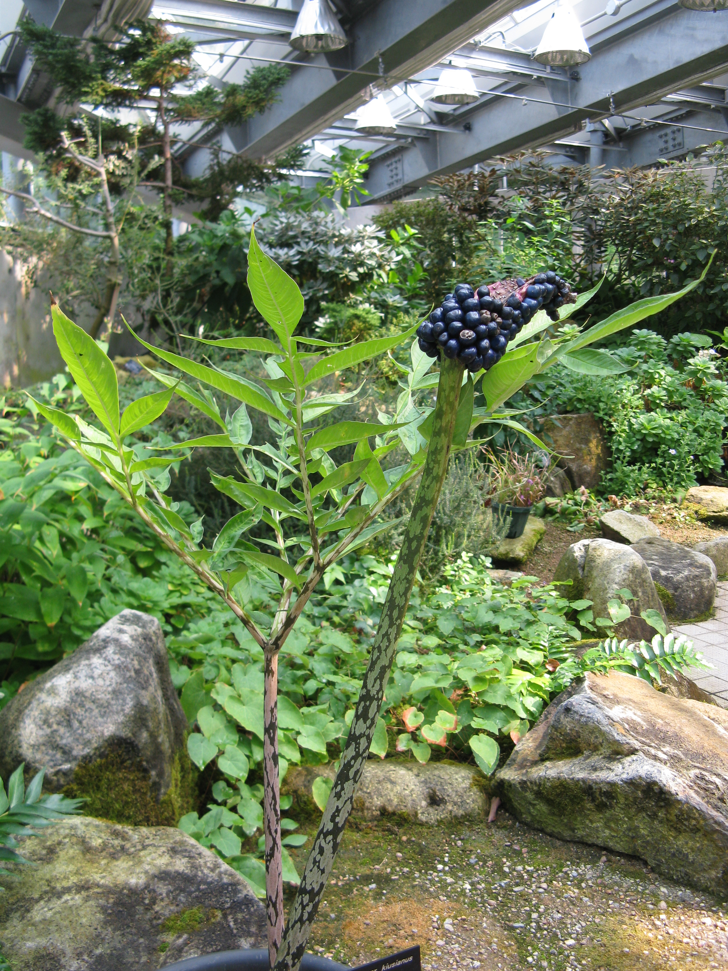 Amorphophallus hirtus var. kiusianus